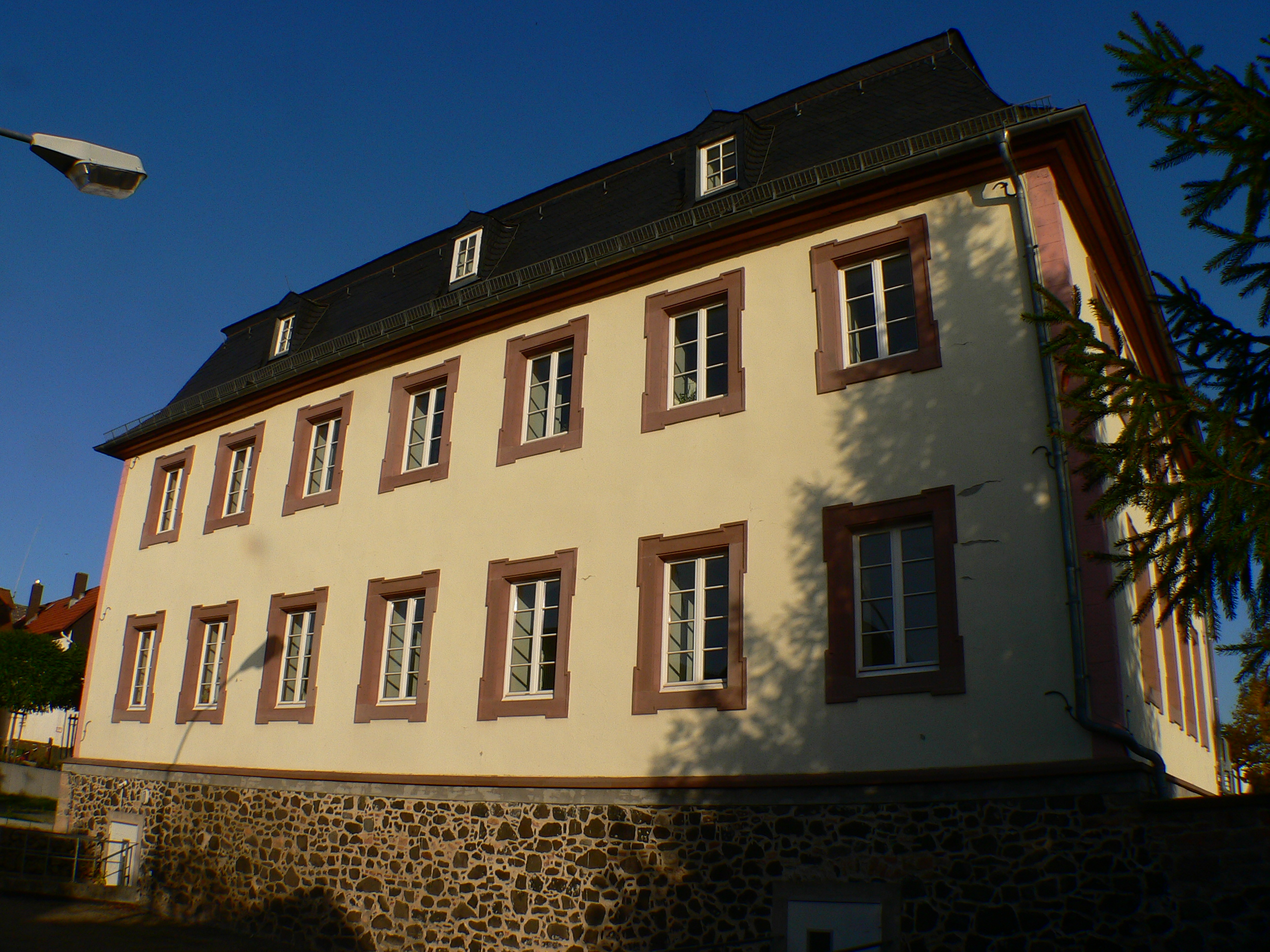 Brandsburg in Buseck im Landkreis Gießen, Hessen, Deutschland